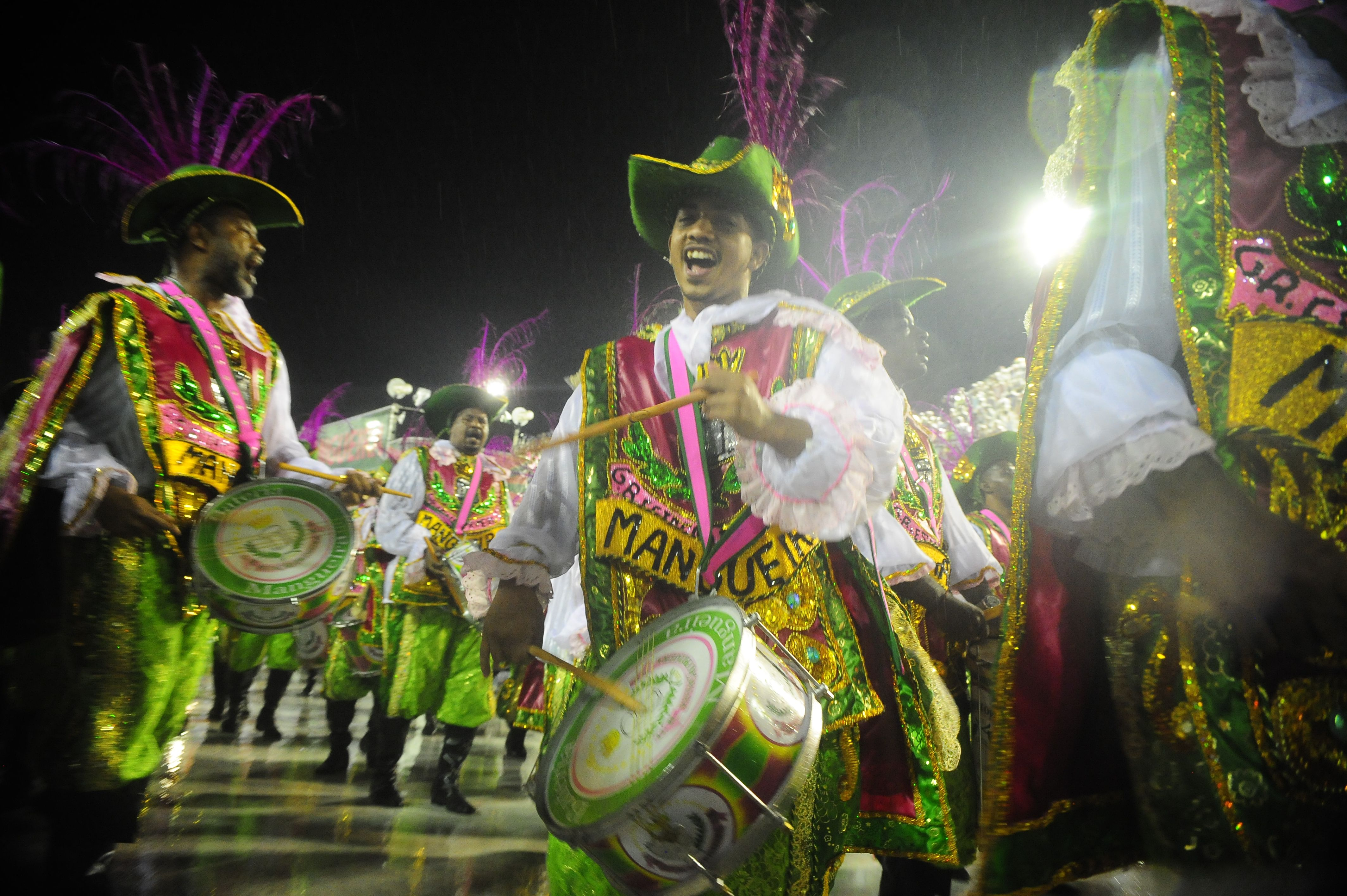 �Primeiro dia de desfile do Grupo Especial das Escolas de Samba do Carnaval 2015. Desfile da primeira escola: G.R.E.S Estação Primeira de Mangueira (Tânia Rêgo/Agência Brasil)